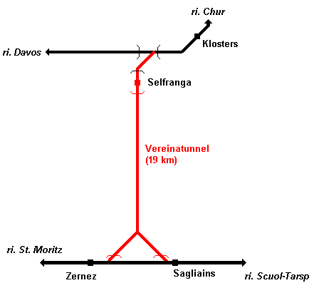 Eigen werk